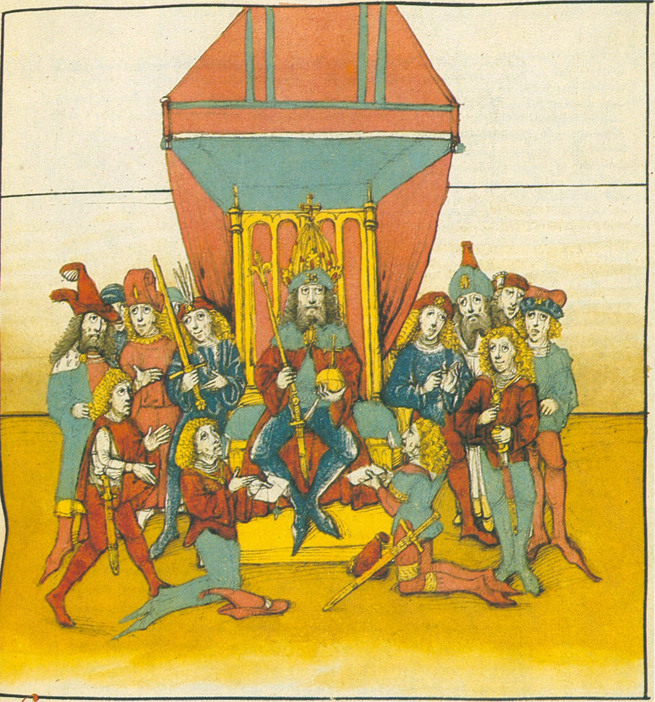 Kaiser Sigismund vergibt Lehen und läßt sich huldigen